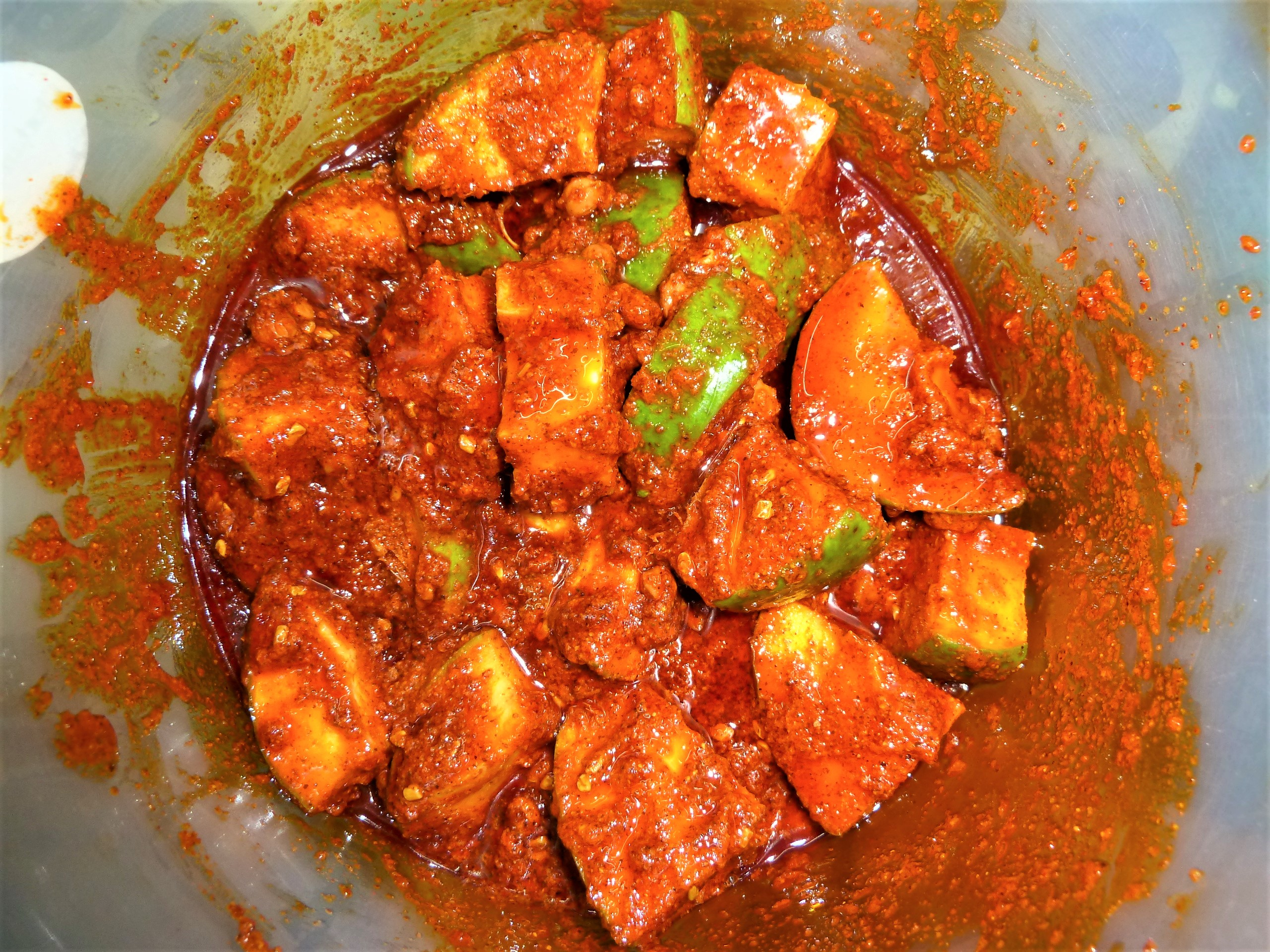 కొత్త ఆవకాయ